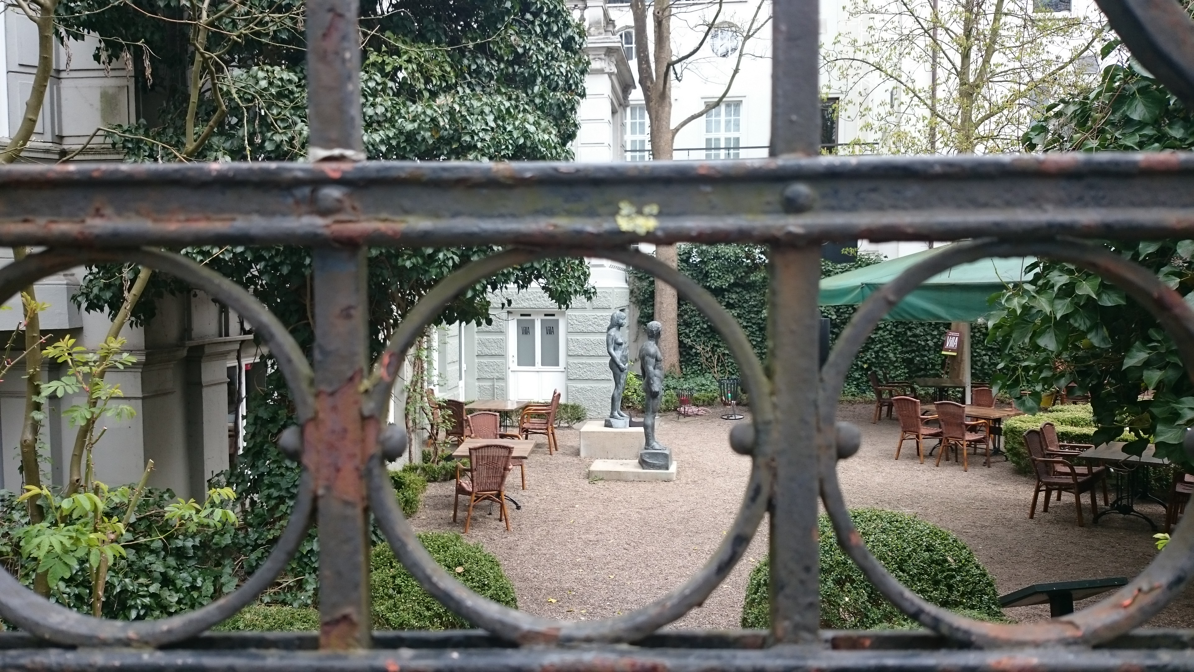 Villa Ichon in Bremen, Goetheplatz 4Das abgebildete Objekt ist ein geschütztes Kulturdenkmal in der Freien Hansestadt Bremen, mit der Nr. 0451 beim Landesamt für Denkmalpflege registriert.